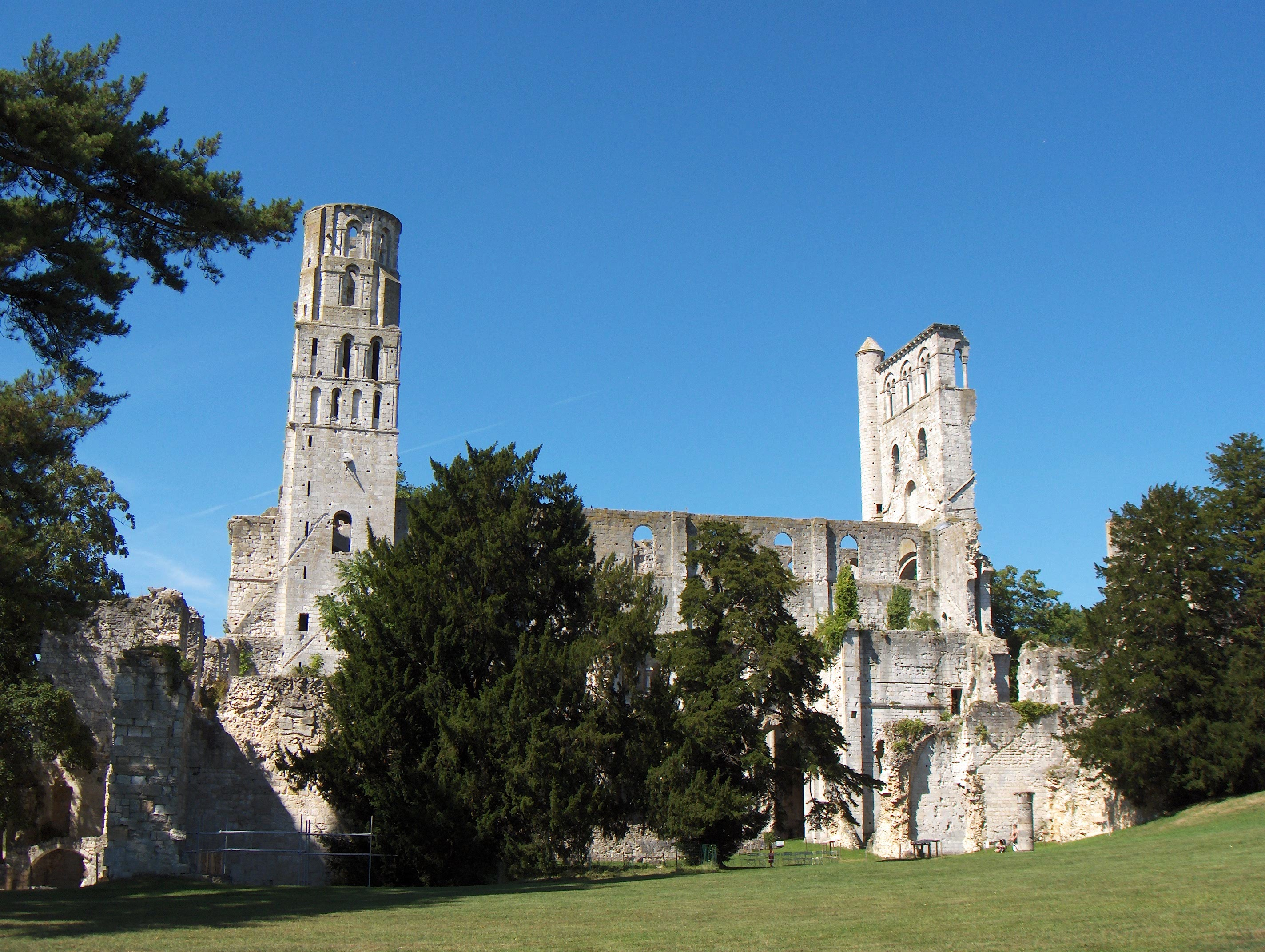 Abtei von Jumièges (Frankreich, Dept. Seine-Maritime), Ruine. Blick von Süden.